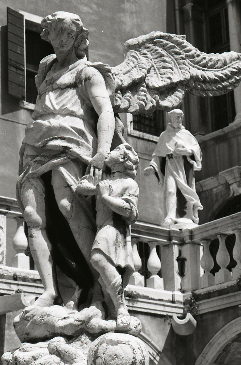 Servizio fotografico : Venezia, 1981 / Paolo Monti. - Strisce: 7, Fotogrammi complessivi: 37 : Negativo b/n, gelatina bromuro d'argento/ pellicola ; 35 mm. - ((Sul portanegativi: N[I]K[MA]T FP4. - Occasione: Seminario di fotografia a Palazzo Fortuny e Documentazione per la pubblicazione: Crivellari Domenico (a cura di), Venezia, Milano, Electa, 1982. - Fonte: Agenda di Paolo Monti: Nikon Leika 3001-/ Monti 1978 (1978-1982), presso Archivio Paolo Monti. - Fonte: Monografia di Crivellari Domenico (a cura di): Venezia, Milano, Electa (1982)